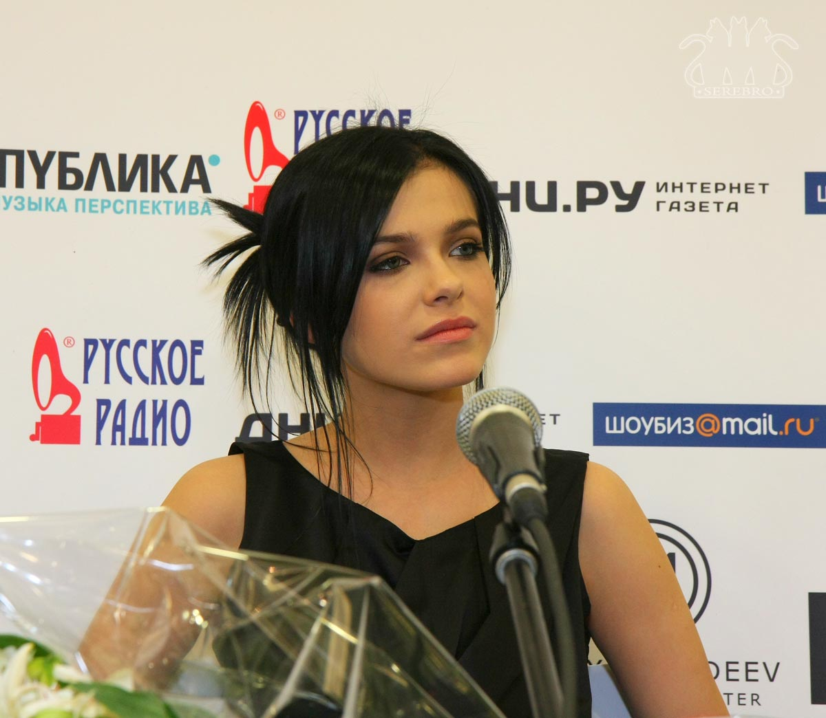 Елена Темникова на презентации альбома "ОпиумRoz" 24 апреля 2009 года